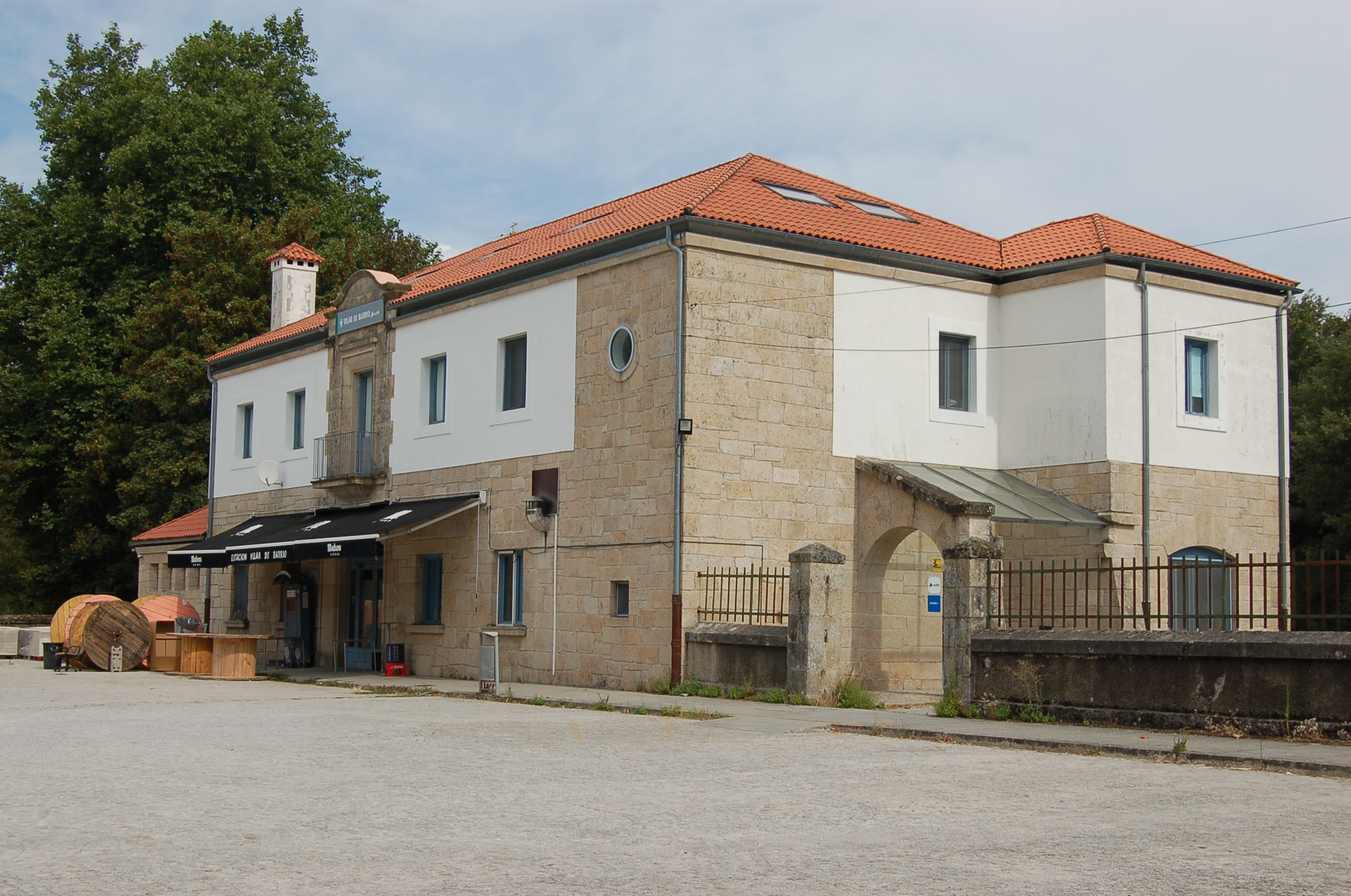 Estación de ferrocarril de Vilar de Barrio